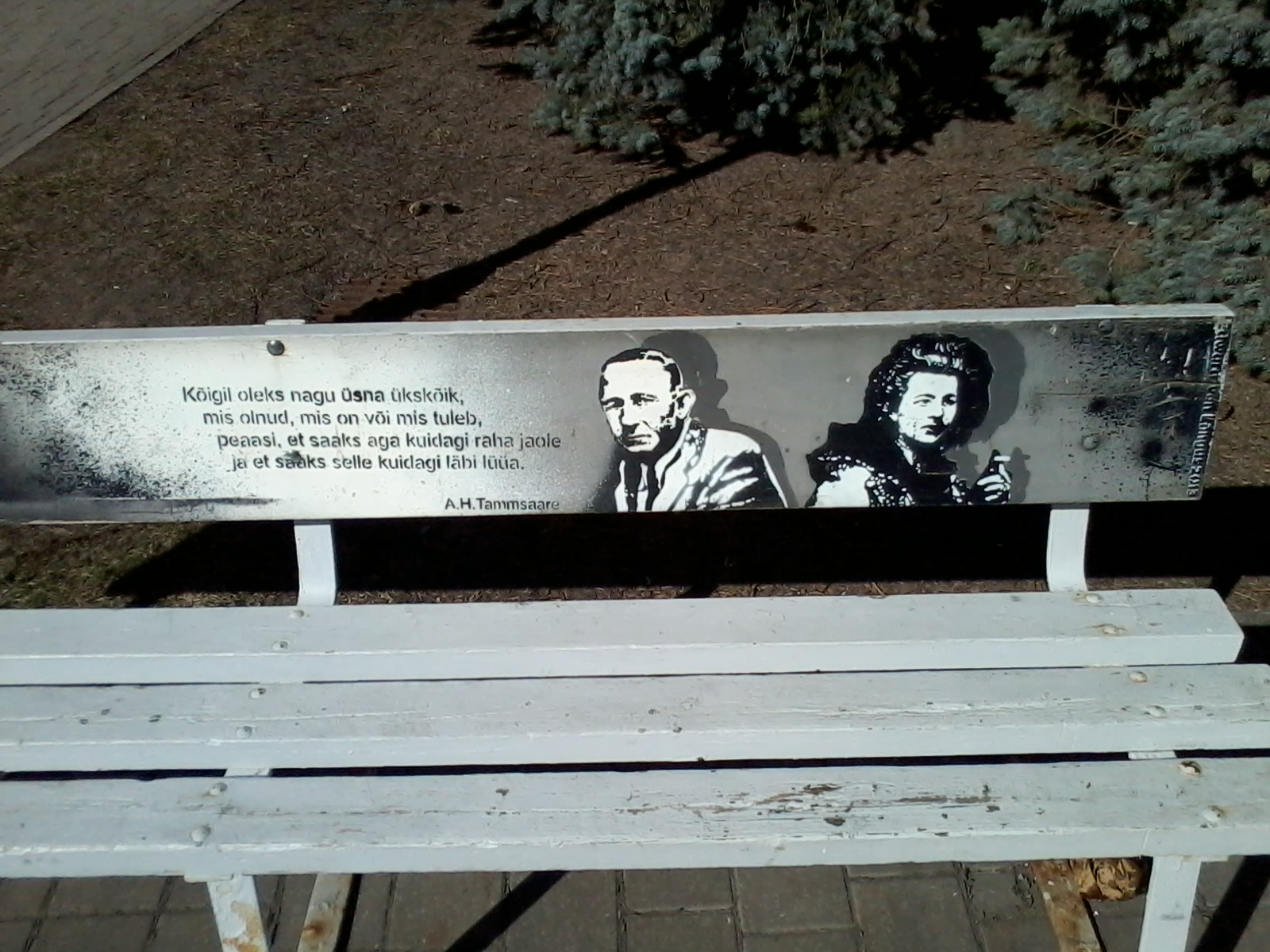 Tammsaaret ja Koidulat kujutav grafiti Tartus, Tartu Linnaraamatukogu ees pingil